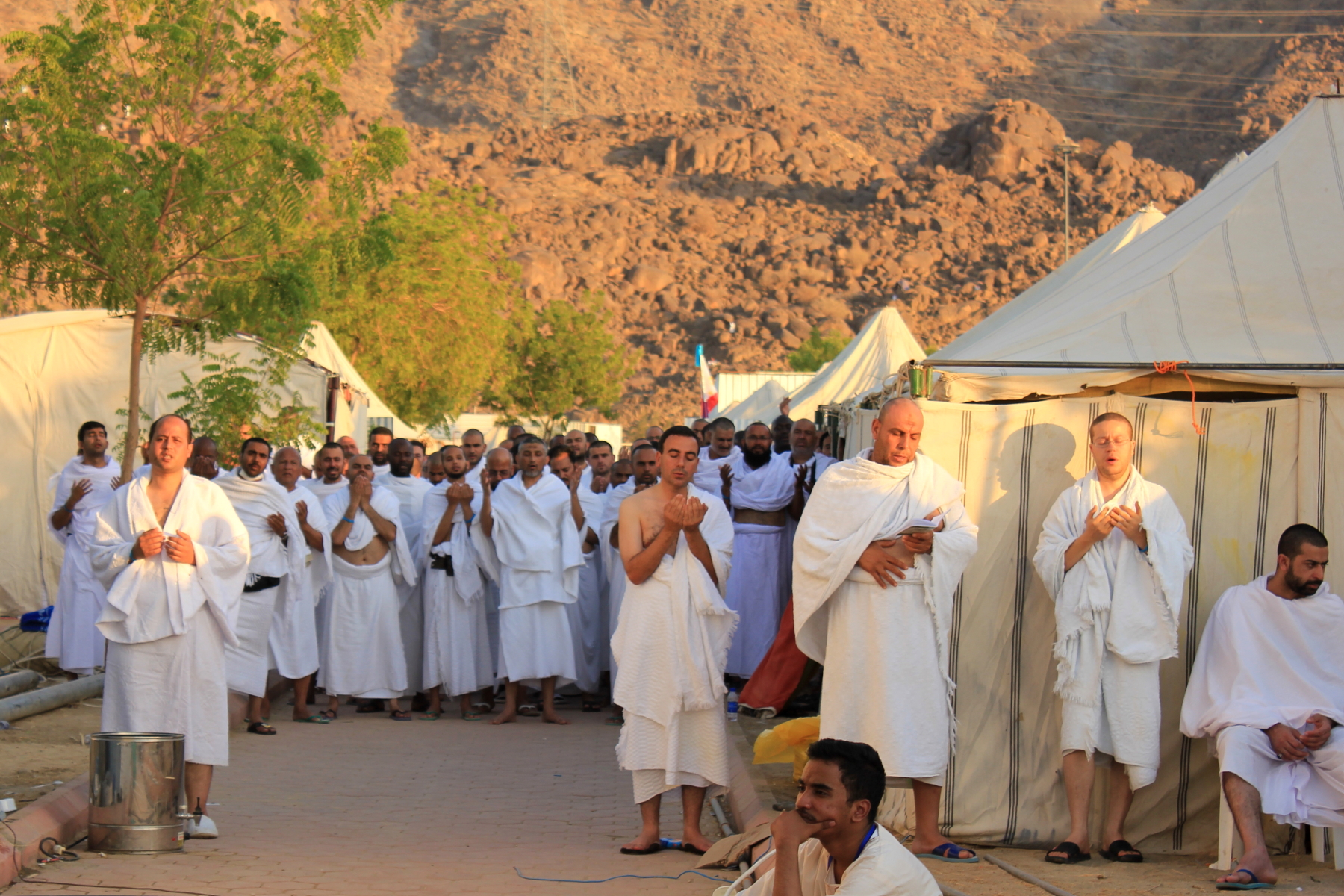 Wukuf di arafah